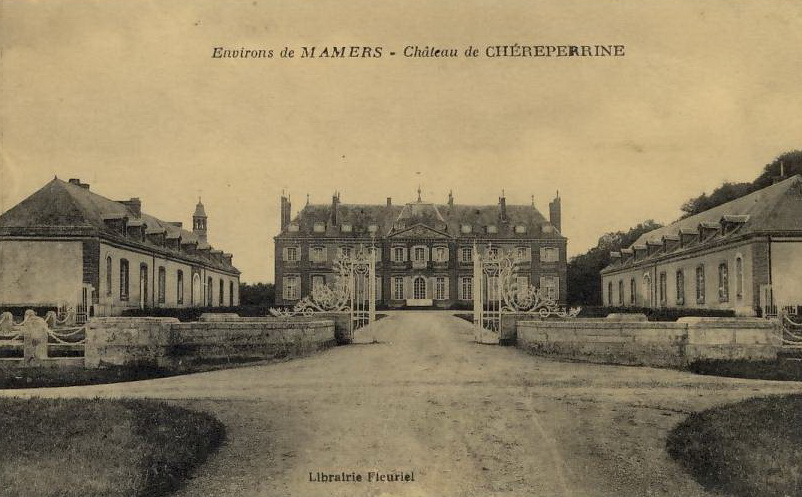 Le château de Chèreperrine au début du XX e siècle avec ses communs (Orne)